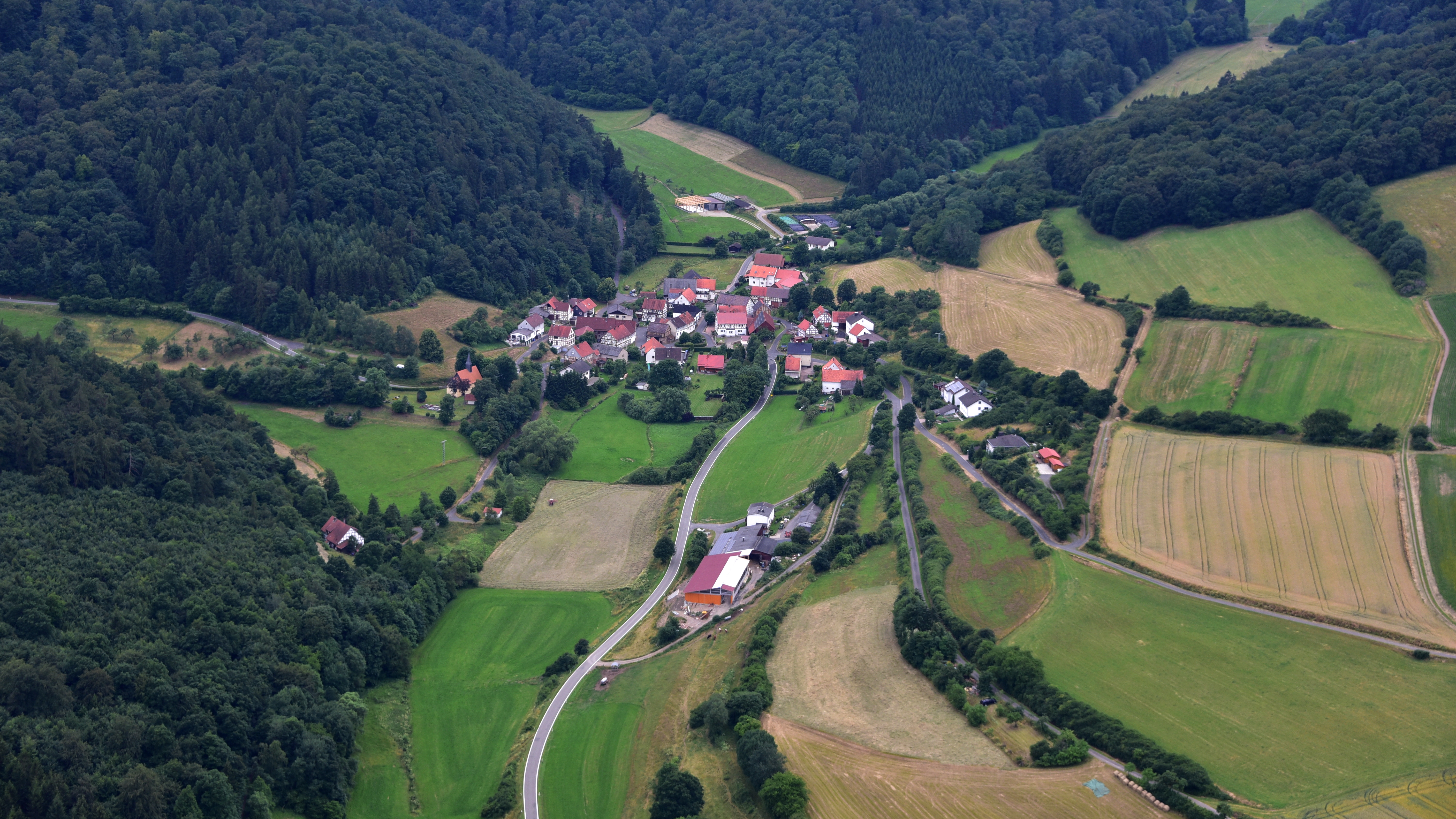 Hüddingen, Luftaufnahme (2016)